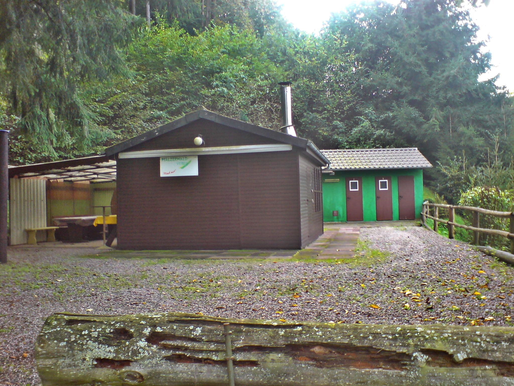 Die Vereinshütte des PWV Eußerthal.